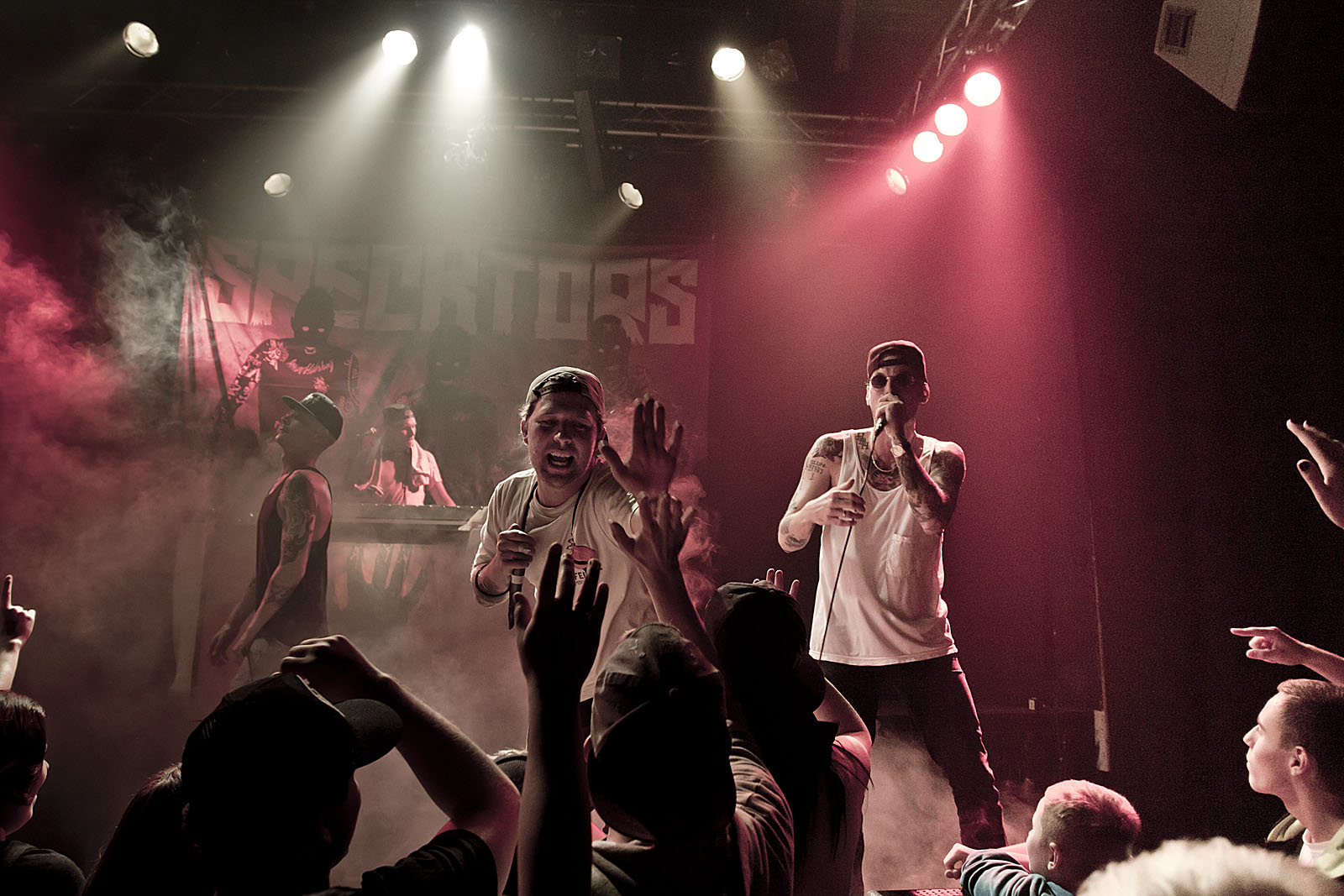 Specktors på Forbrændingen den 28/9-12